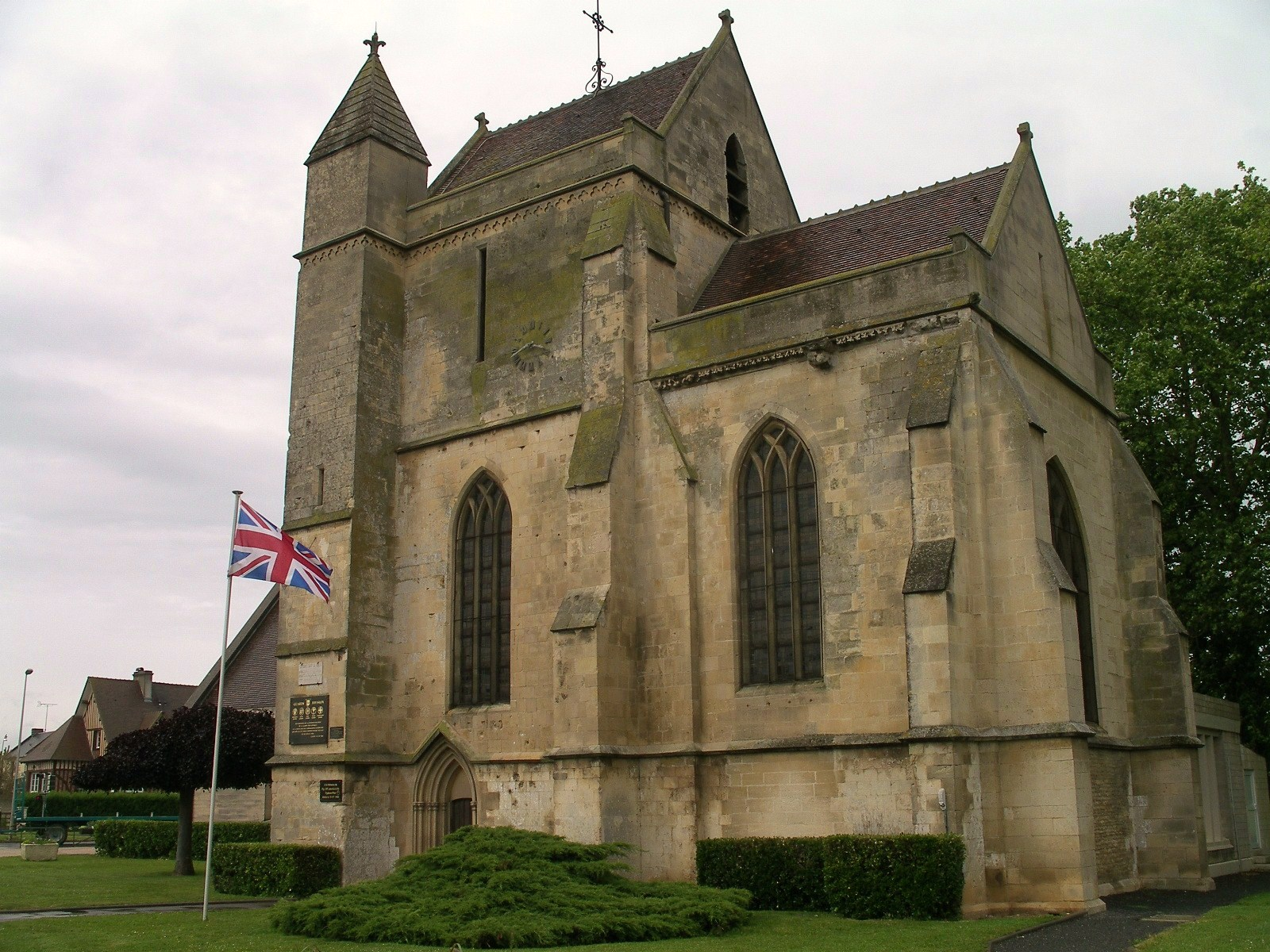 Eglise Saint-Germain à Cagny (Calvados)